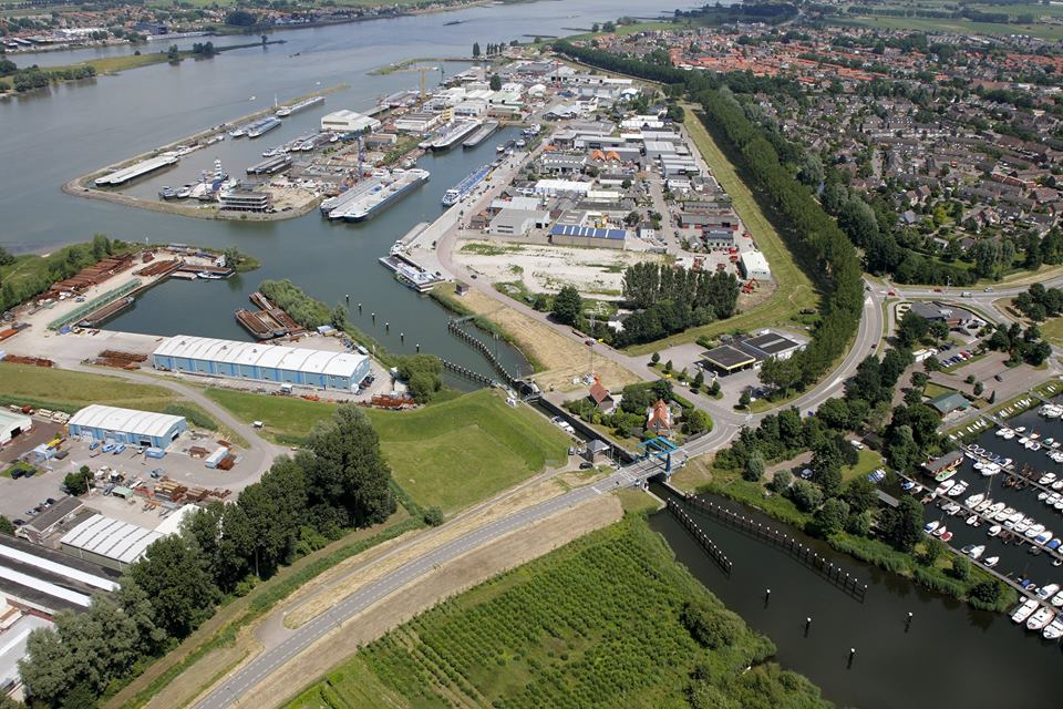 Werkendamse havens. Geheel links de Beatrixhaven. Rechts daarvan de Biesboschhaven, met daaronder de Hakkershaven. Voorbij de Biesboschsluis bevindt zich de Bruine Kilhaven. Helemaal linksboven gaat de Boven Merwede over in de Beneden Merwede en de Nieuwe Merwede. Het water rechtsonder is het Steurgat.